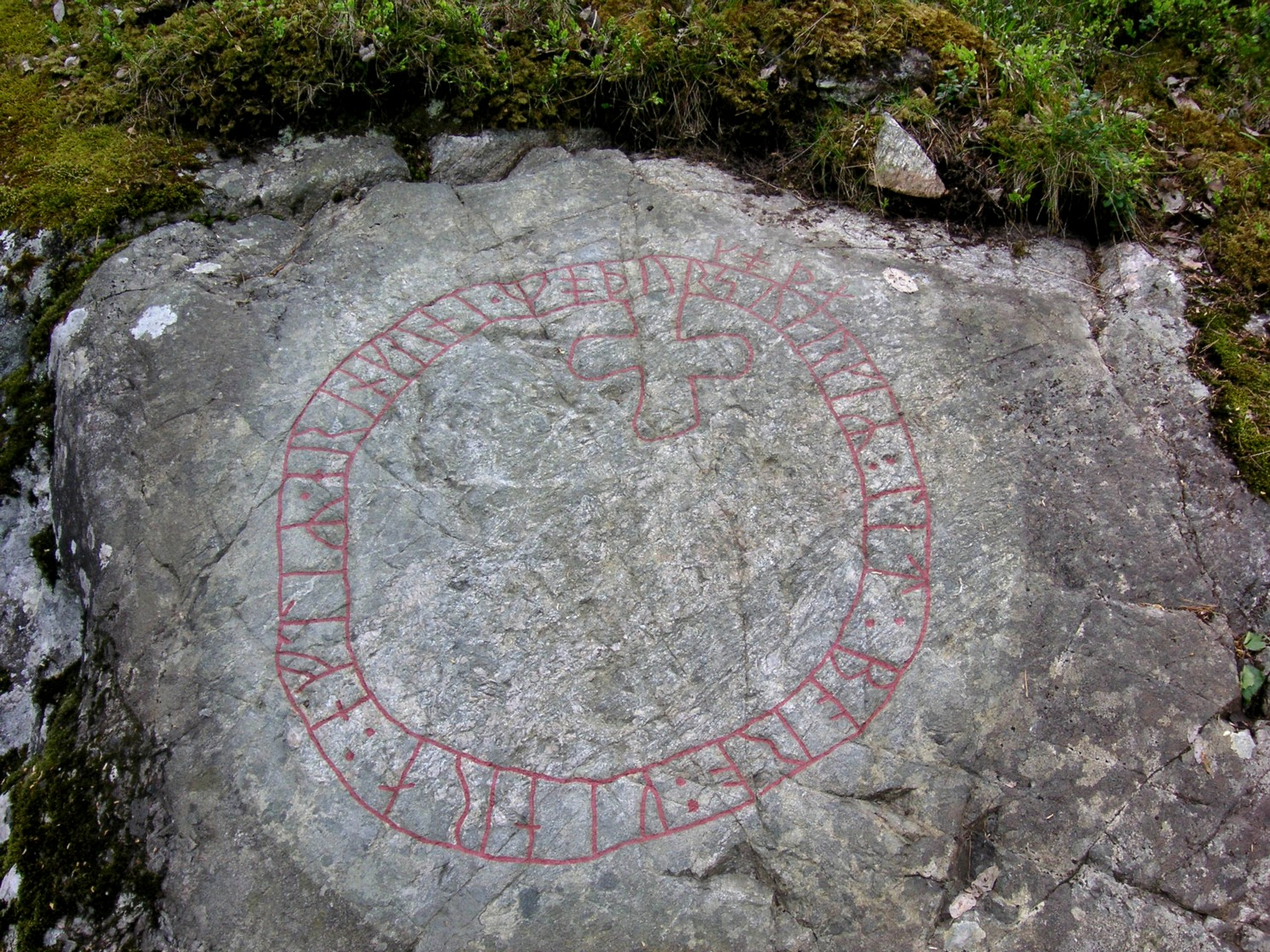 Huddinge kommun, runsten nr Sö 300, "Gömmarstenen"